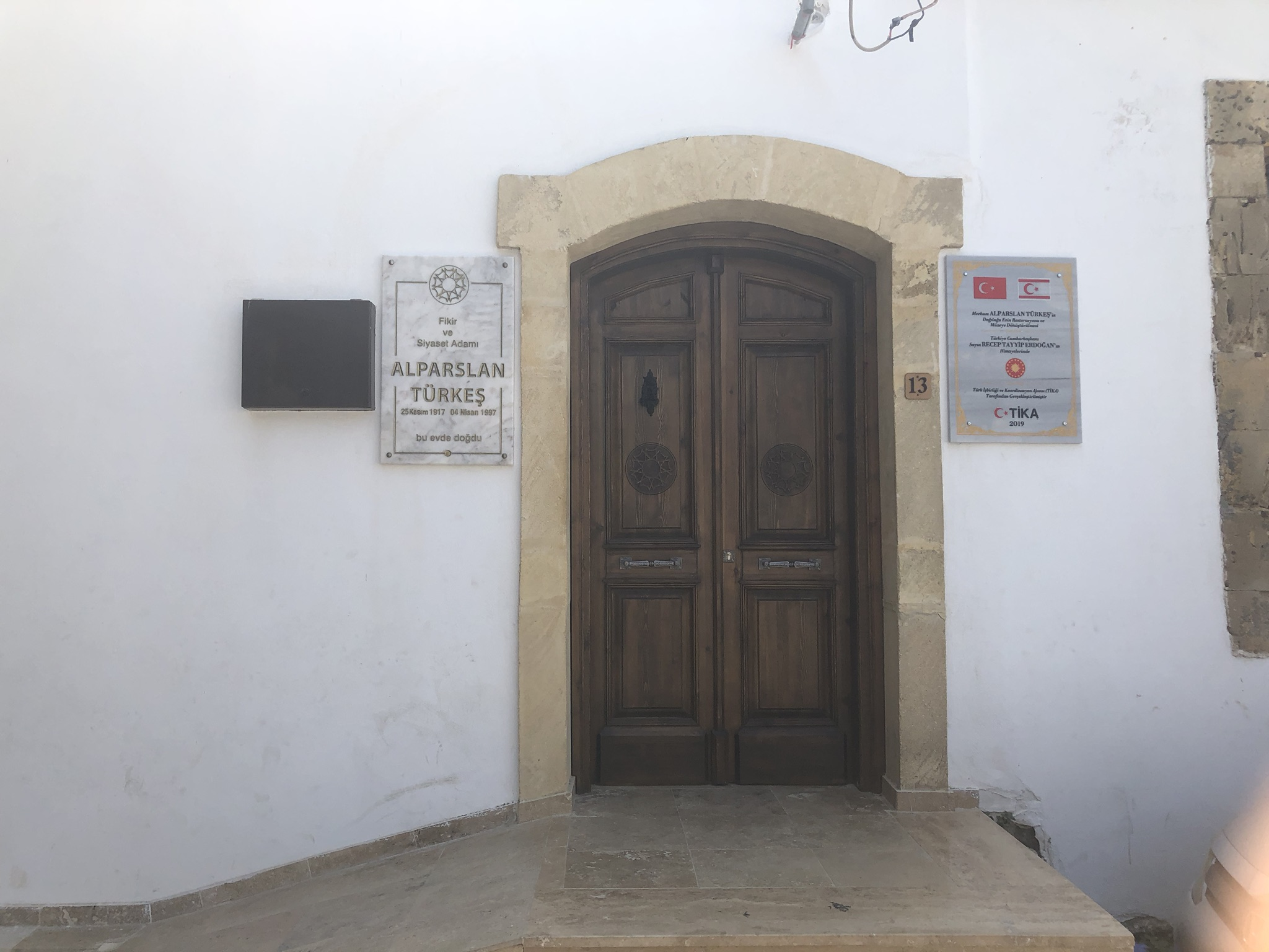 Alparslan Türkeş'in Doğduğu ev